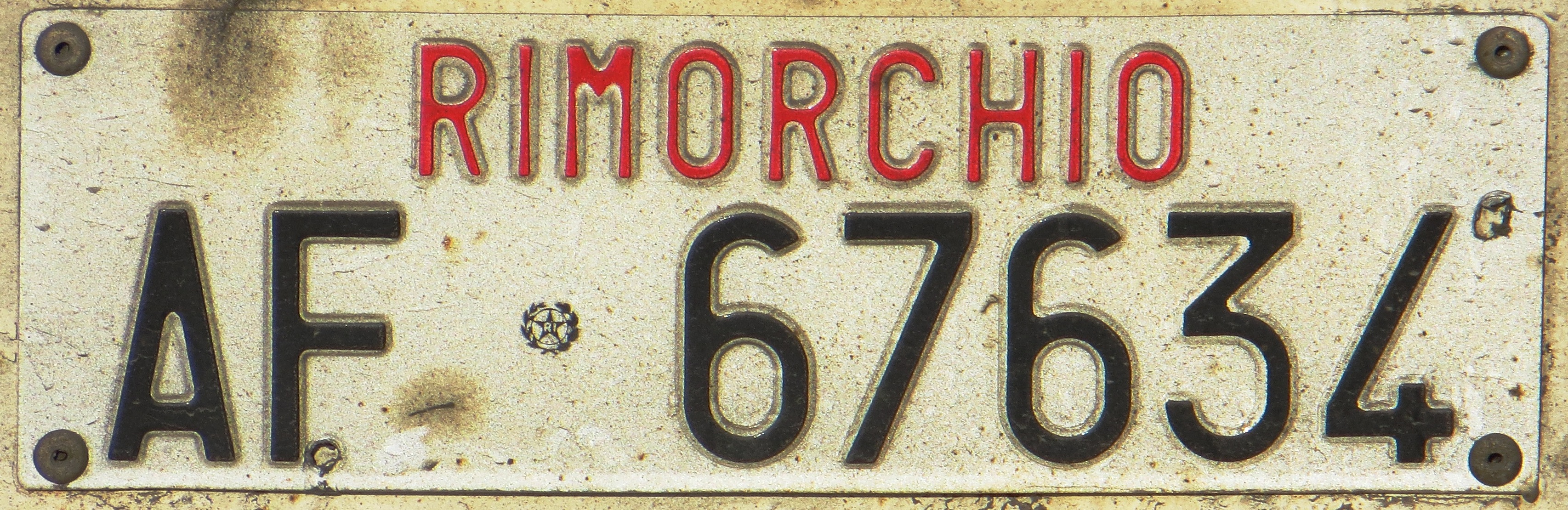 Aanhanger kentekenplaat Italië